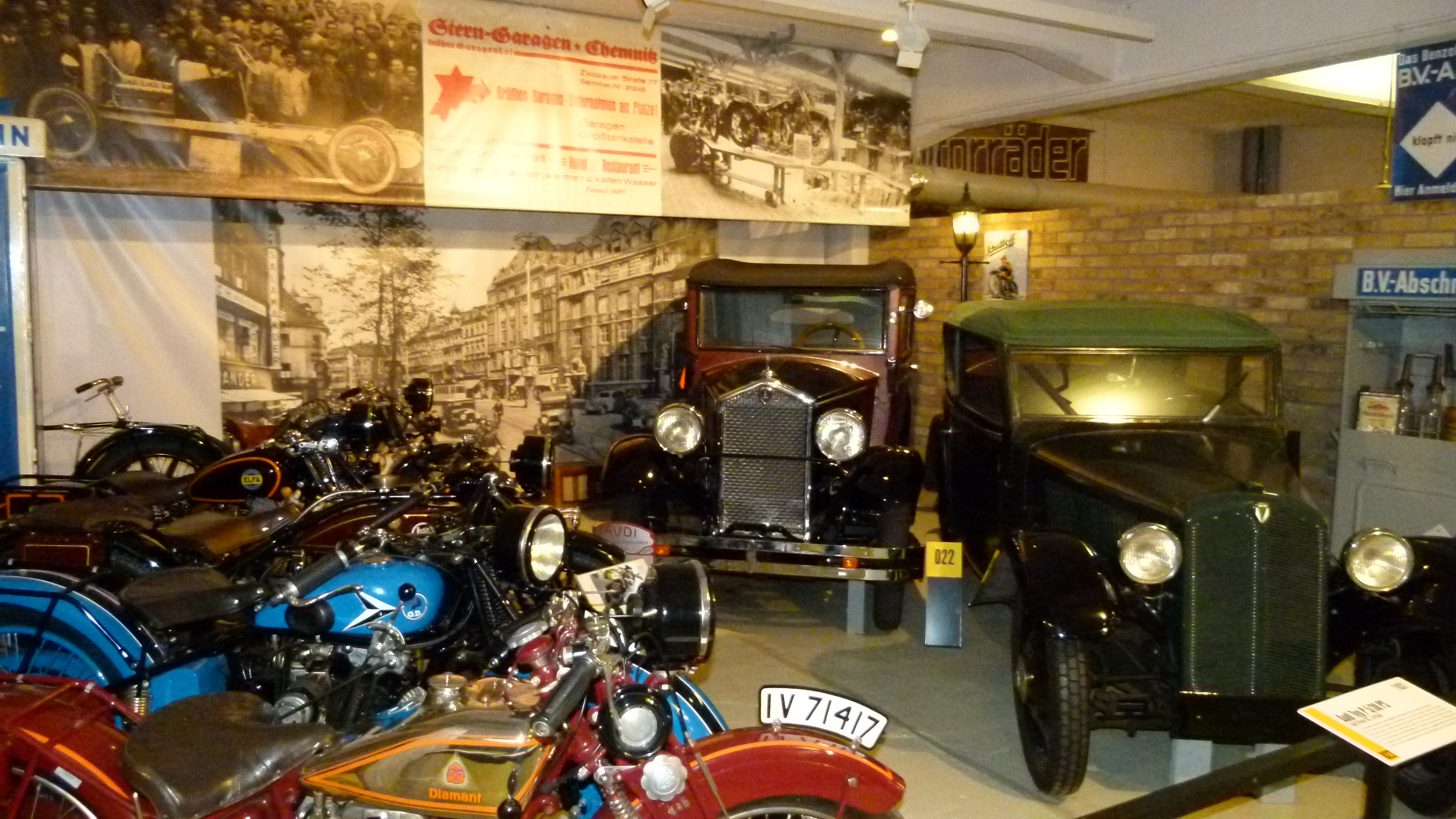 Museum für sächsische Fahrzeuge, Chemnitz